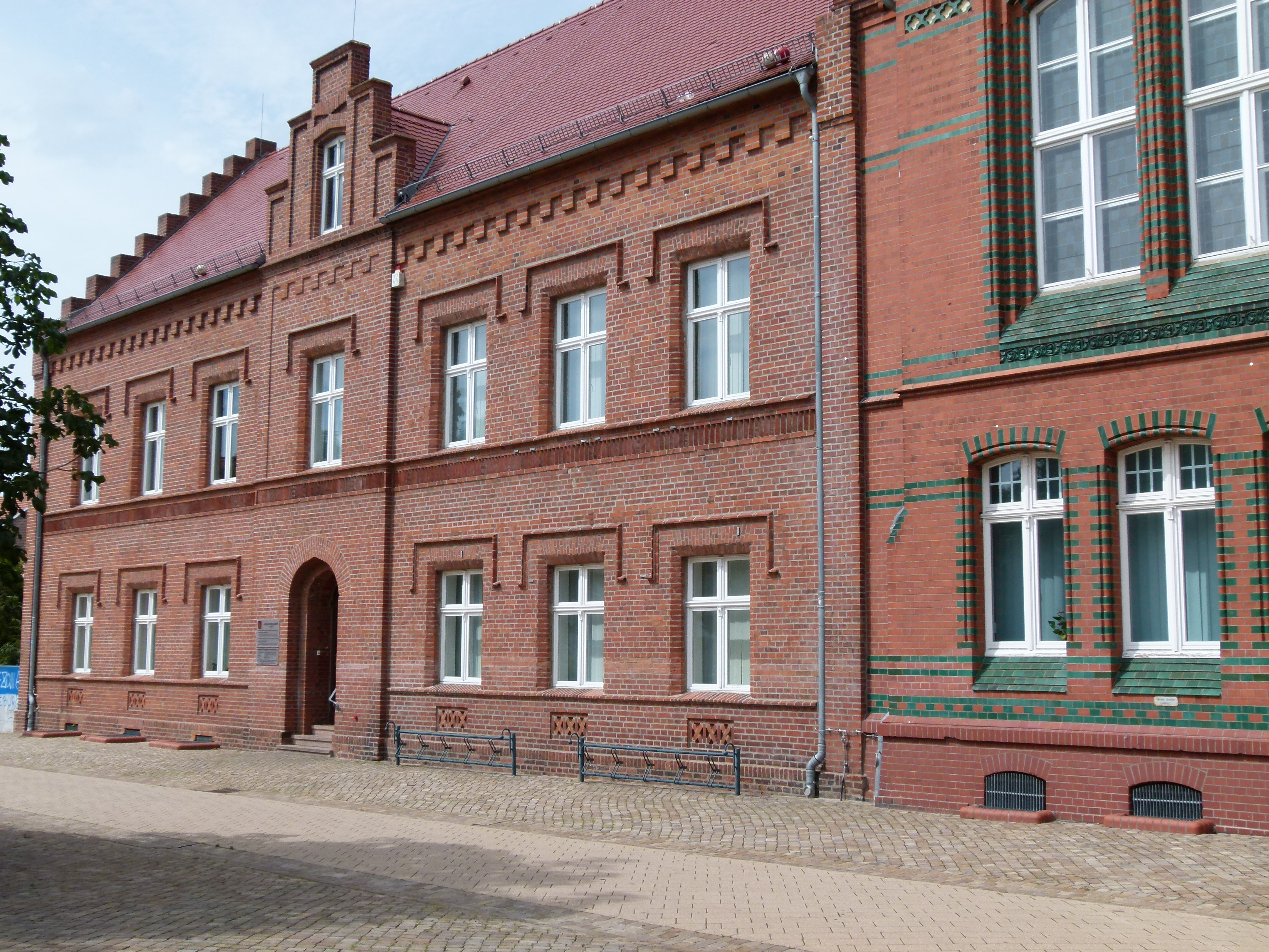 Marktplatz 4 in Genthin